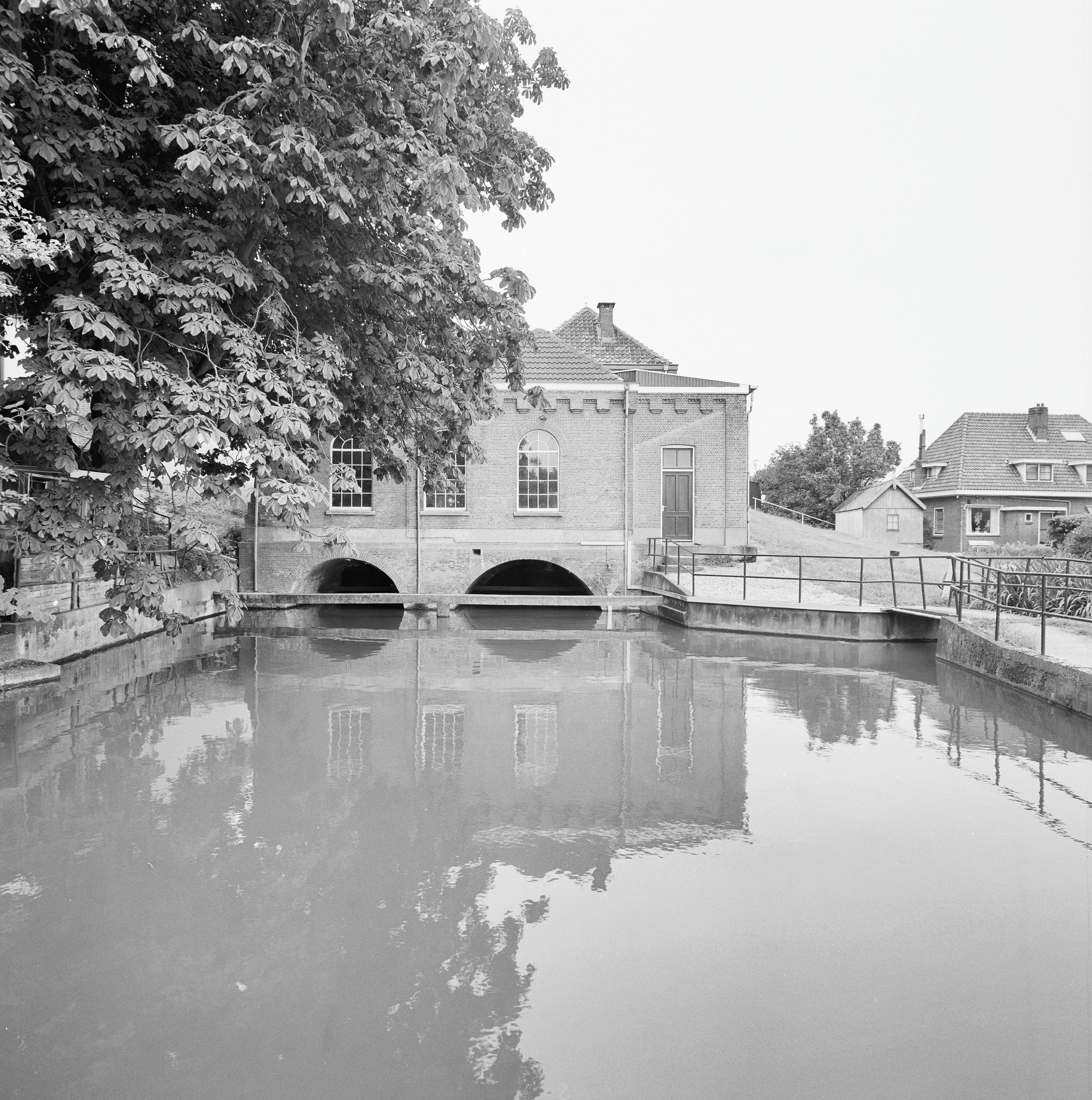 GEMAAL VERDOOLD: Exterieur OVERZICHT ACHTERGEVEL